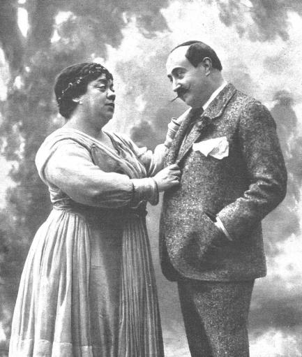 Leocadia Alba y Emilio Thuillier en una escena de la obra de teatro La señorita de Trevélez, de Carlos Arniches